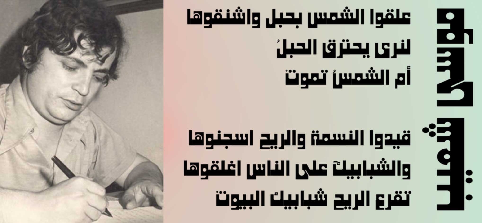 قصيدة للشهيد موسى شعيب